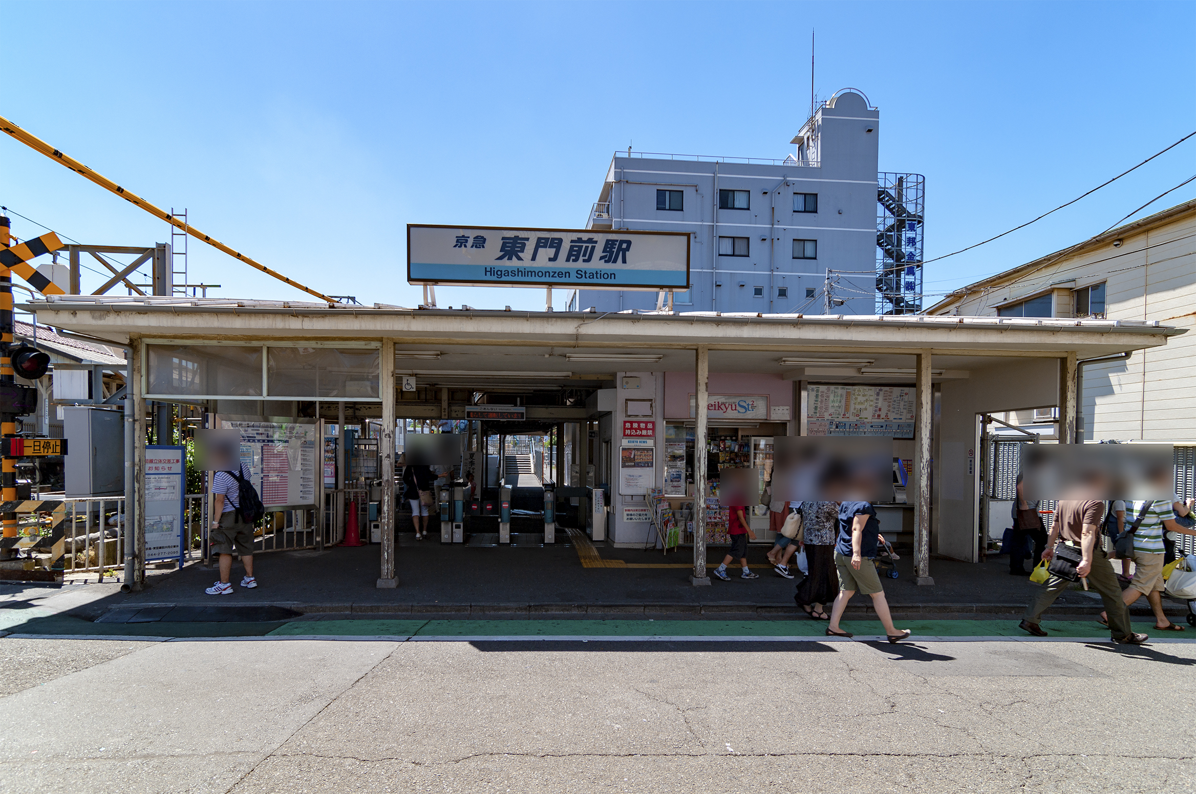 京浜急行電鉄株式会社大師線東門前駅駅舎